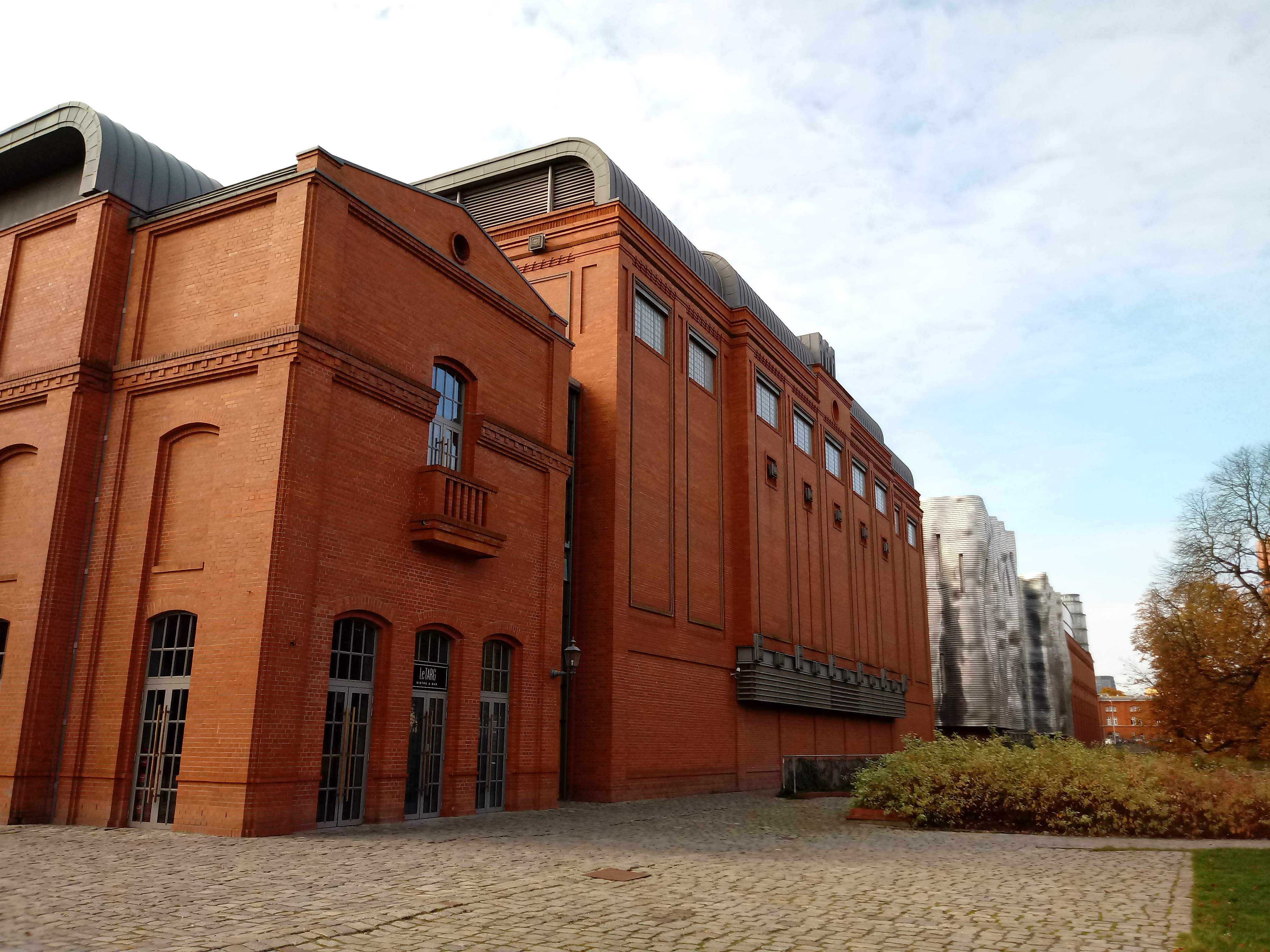 Stary Browar w Poznaniu od strony Parku Dąbrowskiego